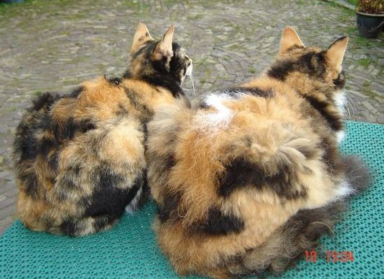 LaPerm cat